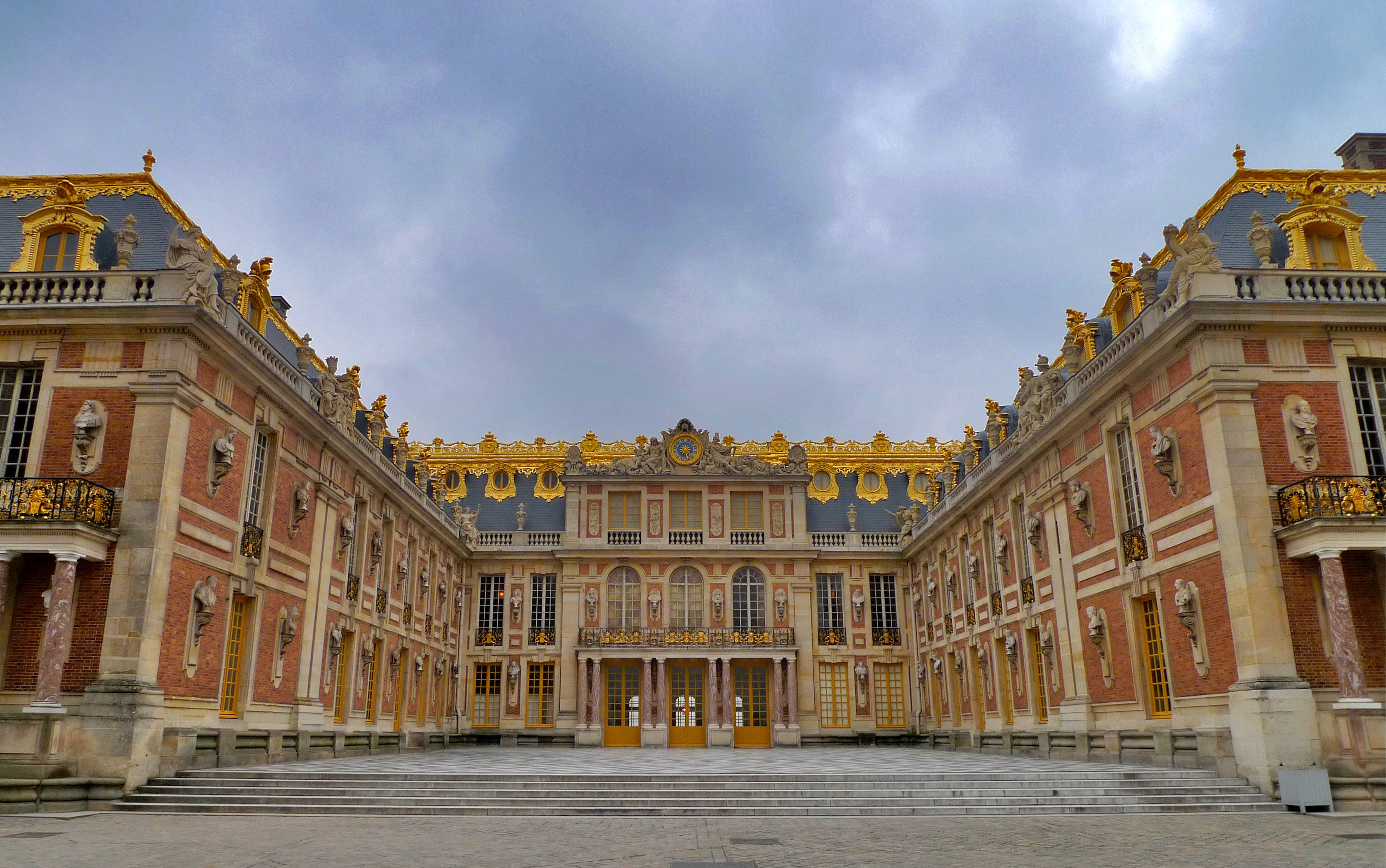 Le château de Versailles est un château et un monument historique français qui se situe à Versailles, dans les Yvelines, en France. Il fut la résidence des rois de France Louis XIV, Louis XV et Louis XVI. Date d'ouverture : 6 mai 1682. Architectes : Louis Le Vau, Jules Hardouin-Mansart, Philibert Le Roy.